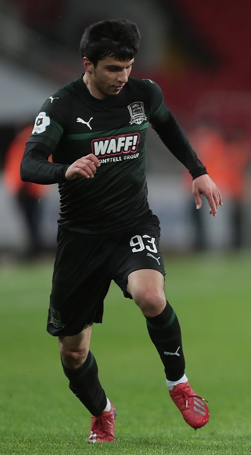 Футбольный матч «Спартак» — «Краснодар» 3 марта 2019 года. На фото — Магомед-Шапи Сулейманов.